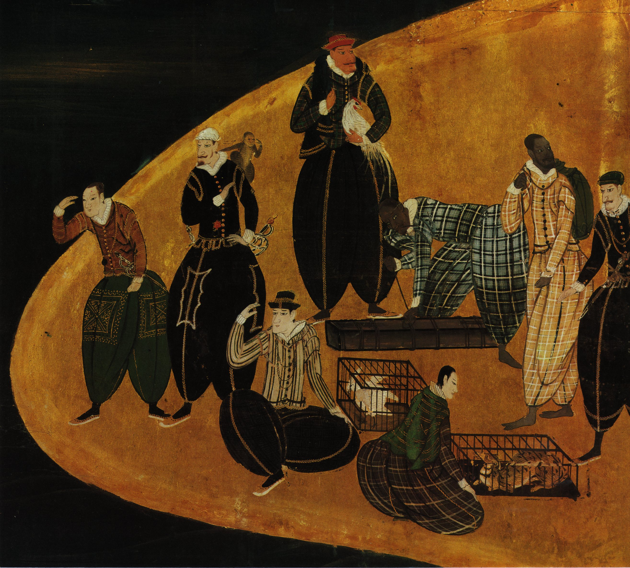 "Namban" art panels detail